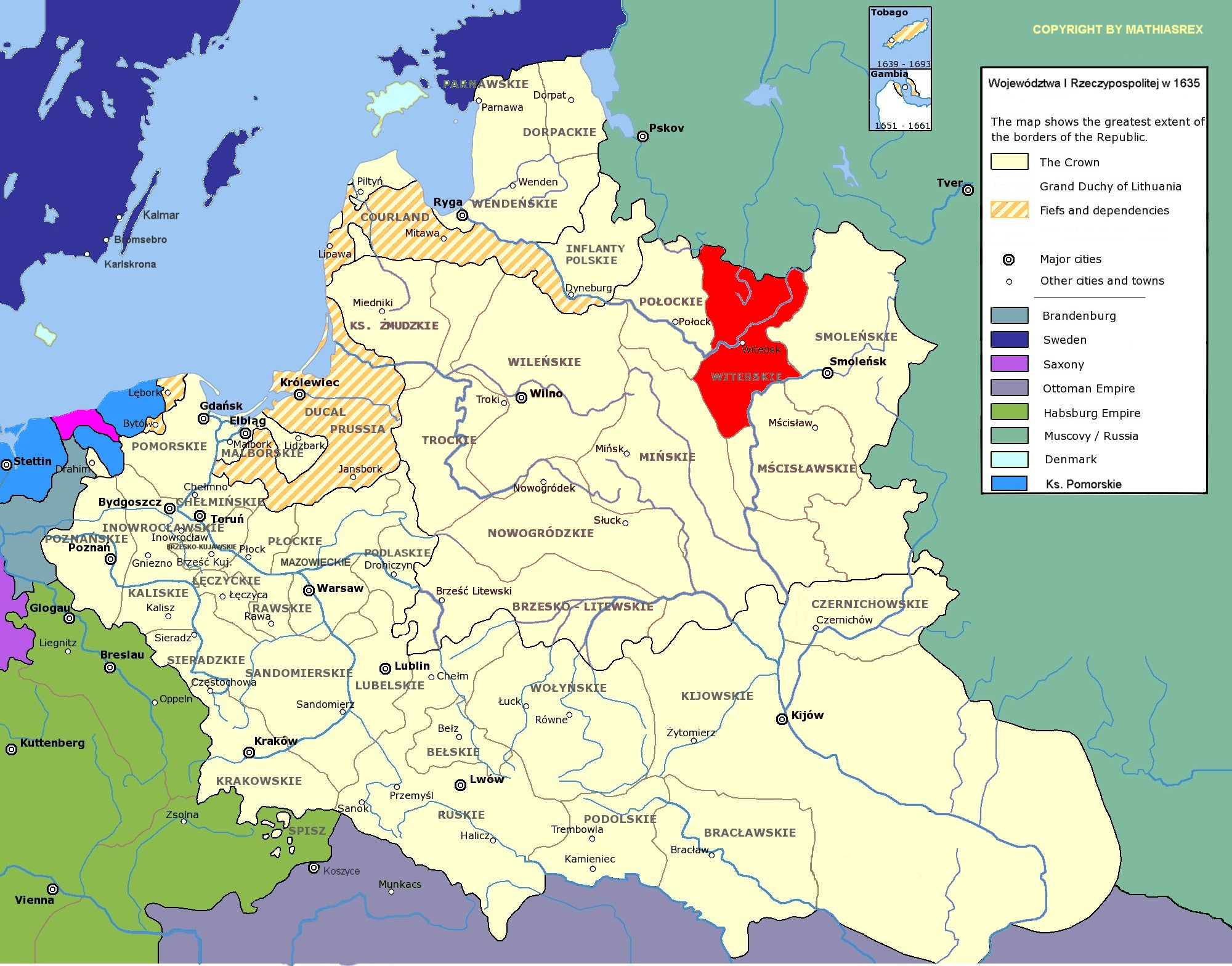 województwo witebskie I Rzeczypospolitej A modified copy of Image:Rzeczpospolita voivodships.png by Halibutt and user:Mathiasrex